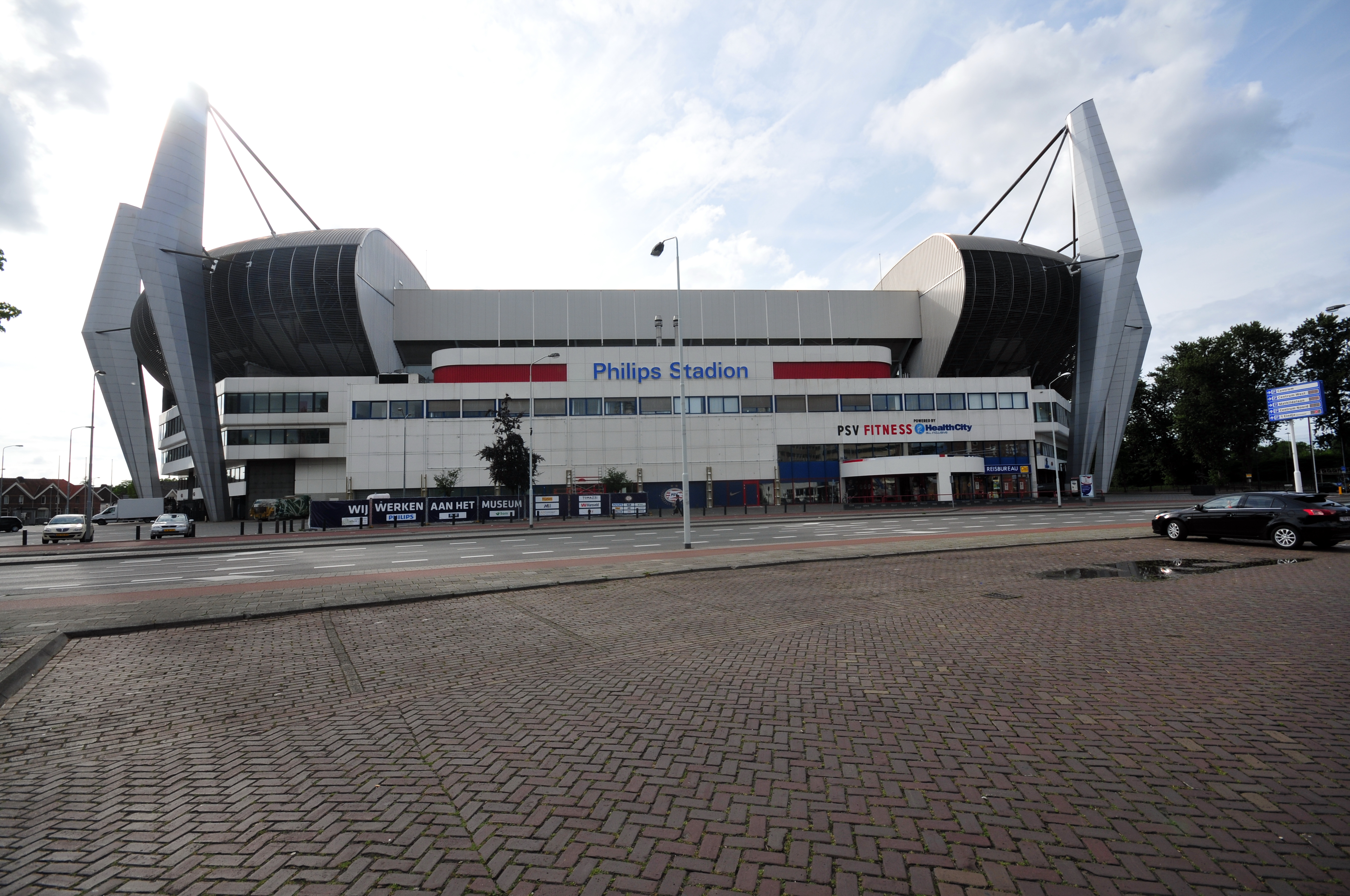 Eindhoven, Niederlande, 2013